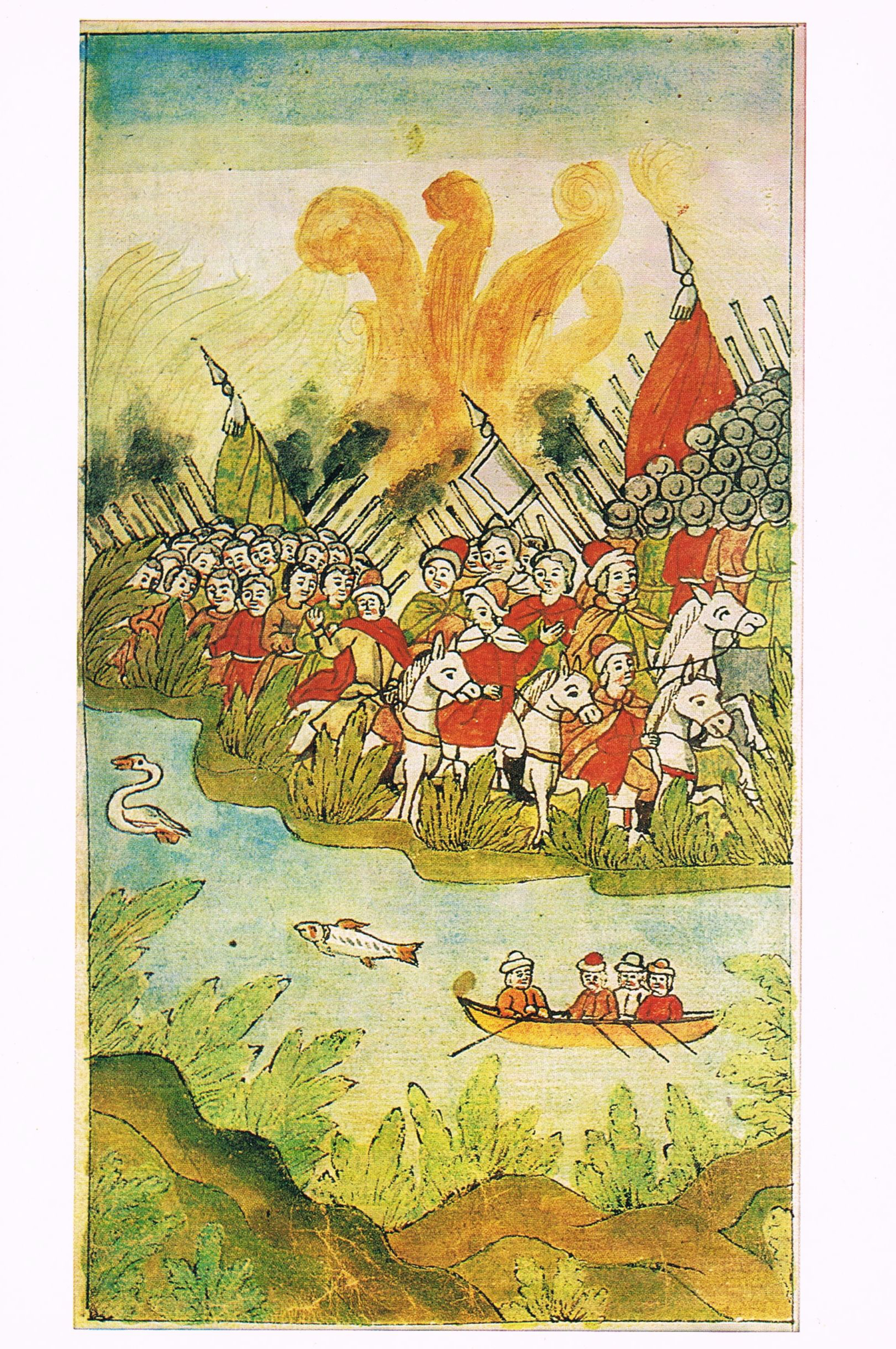 Неудачный поход В.В. Голицына против Крымского ханства. Художником изображено возвращение войска вдоль берега реки Самары Миниатюра из рукописи 1-й пол. 18 века "История Петра I", соч. П. Крекшина. Собрание А. Барятинского. ГИМ.